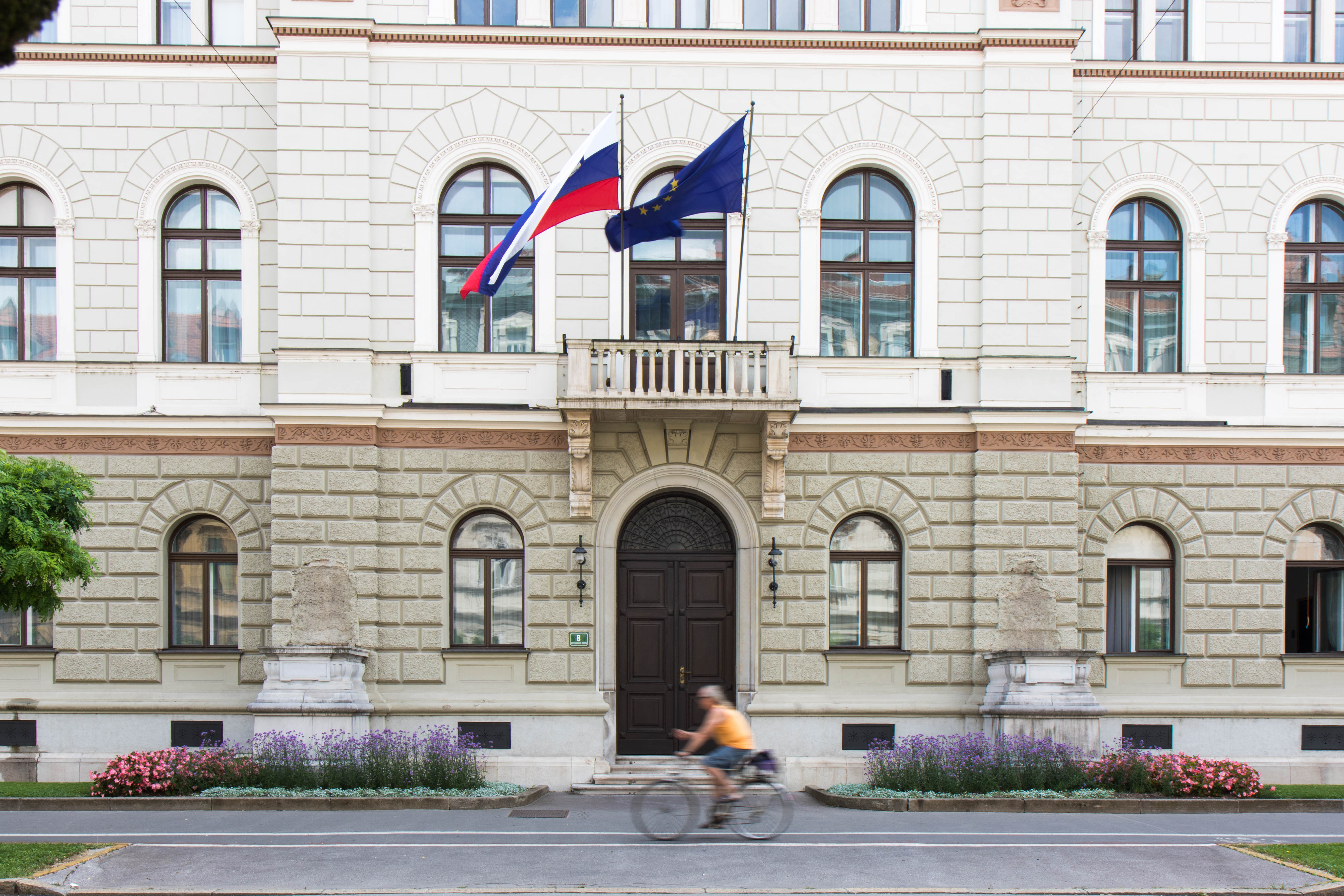 1Z1A9047.jpg